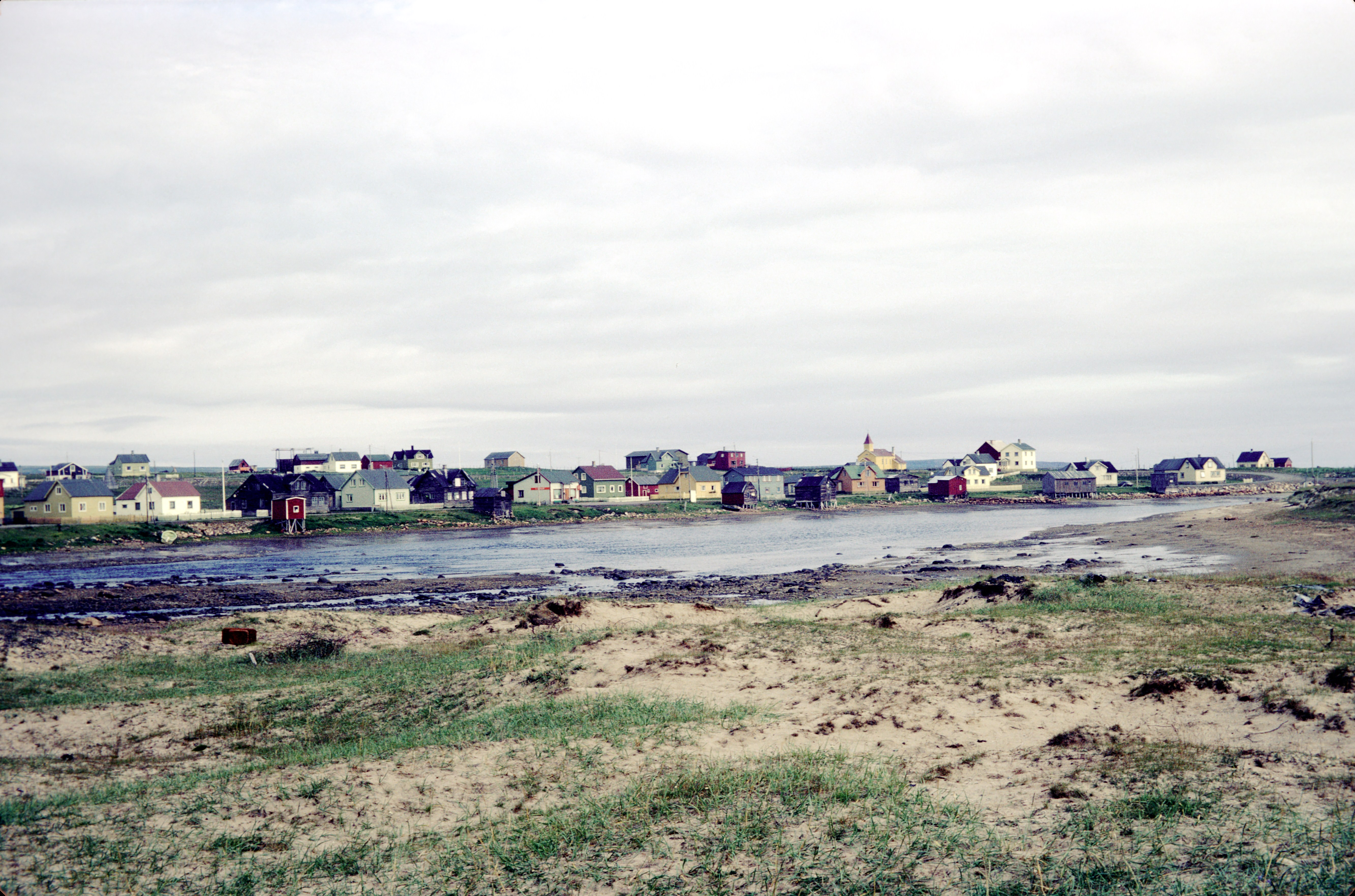 Vue générale du village de Skallelv. En arrière plan, on peut apercevoir l'église peinte en ocre et au clocher rouge. Le village de Skallelv est situé à environ 23 km au nord-est de Vadsø, au bord du Varangerfjorden. Skallelv, Vadsø kommune, Finnmark, Norvège.